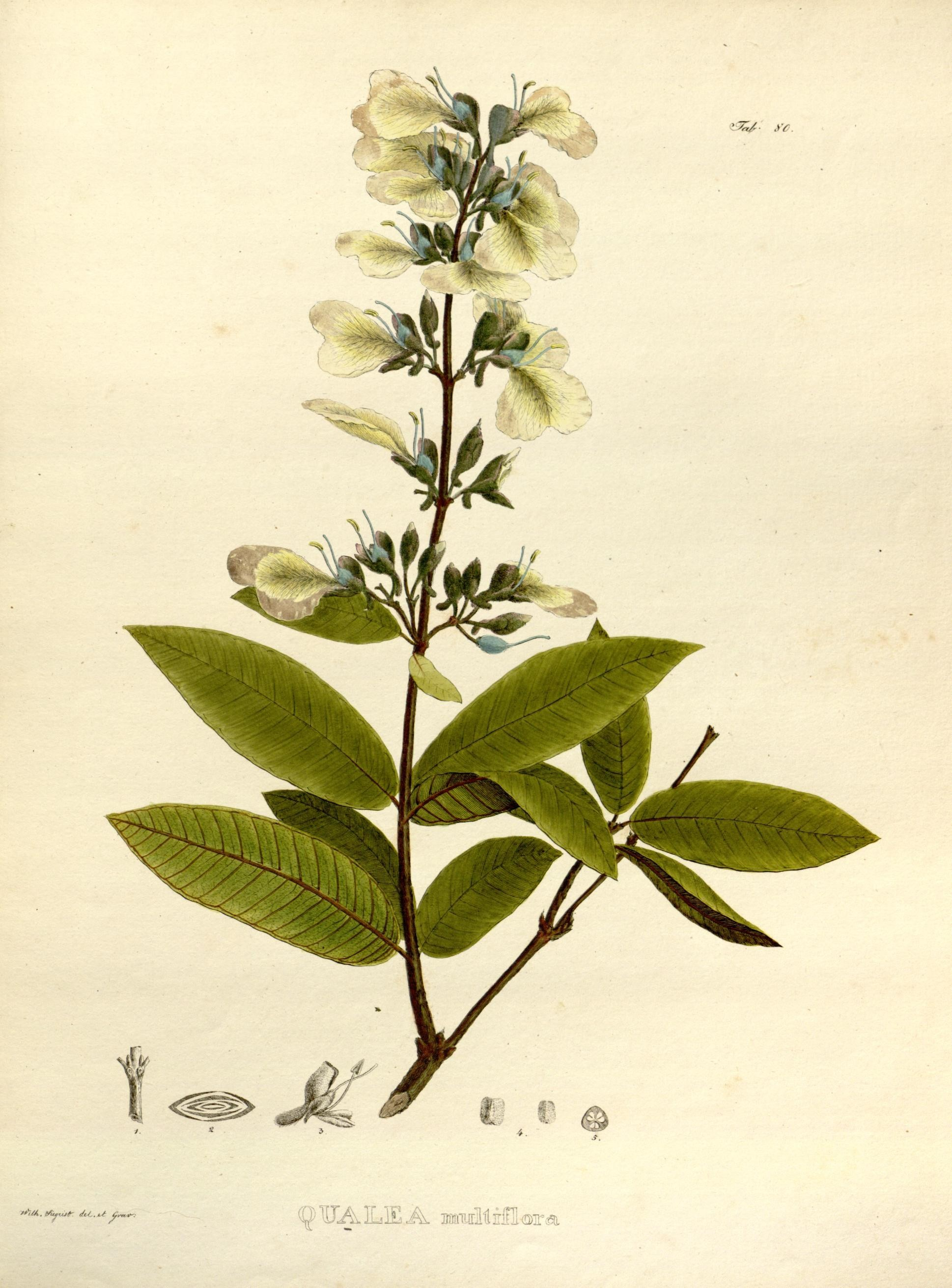 Qualea multiflora Nova genera et species plantarum. Monachii [Munich] :Impensis Auctoris,1824-1829 [i.e. 1824-32]..